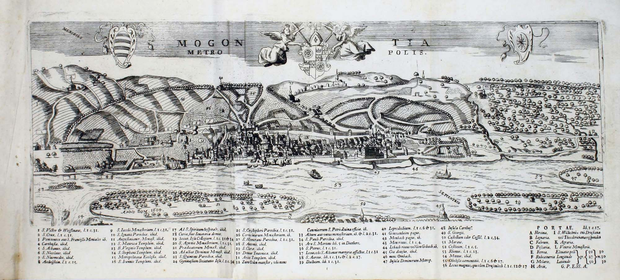 Auzug von Rerum Moguntiacarum libri mit einer Abbildung von Mainz anno 1604.